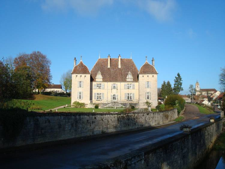 Vue de Filain et de son château (Haute-Saône)